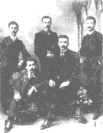 Hristo Yankov